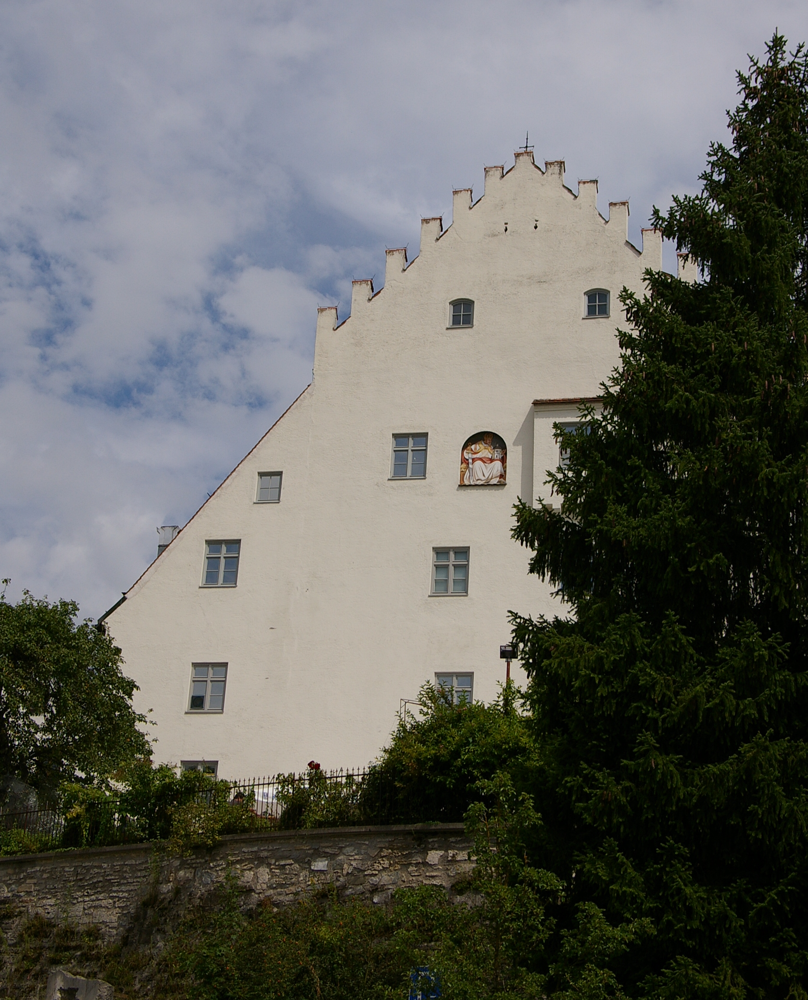 Schloss Murnau im Markt Murnau am Staffelsee im oberbayerischen Landkreis Garmisch-Partenkirchen